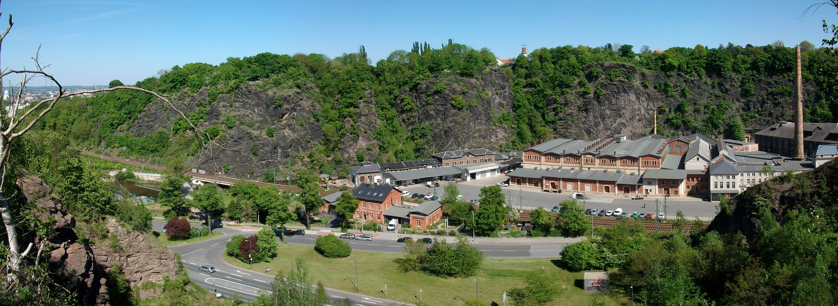 Blick in den plauenschen Grund in Richtung Dresden-Plauen; gegenüber dem Aussichtsturm Hoher Stein und der ehemaligen Felsenkellerbrauerei.